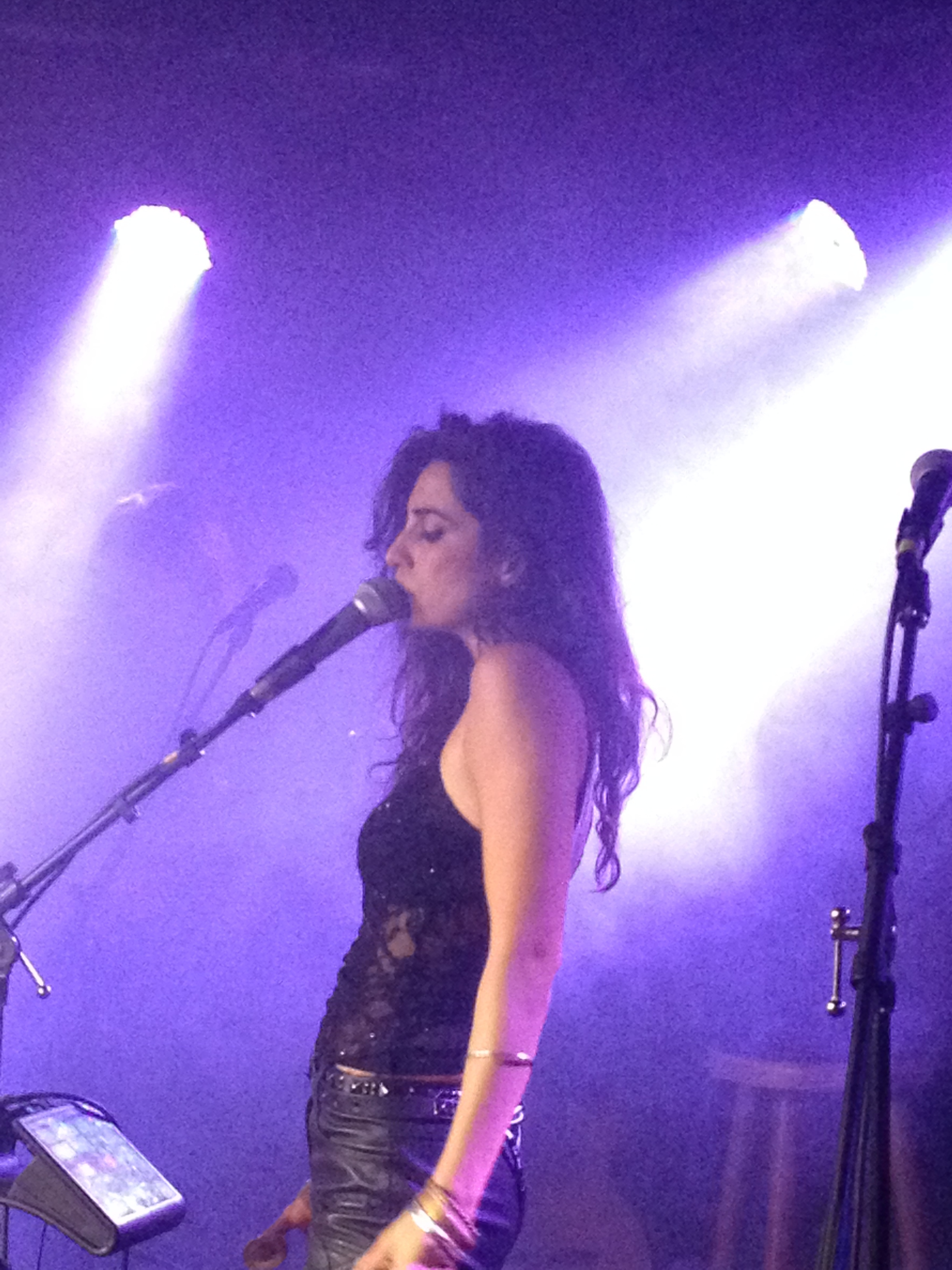 Yasmine Hamdan in Berlin, Privatclub